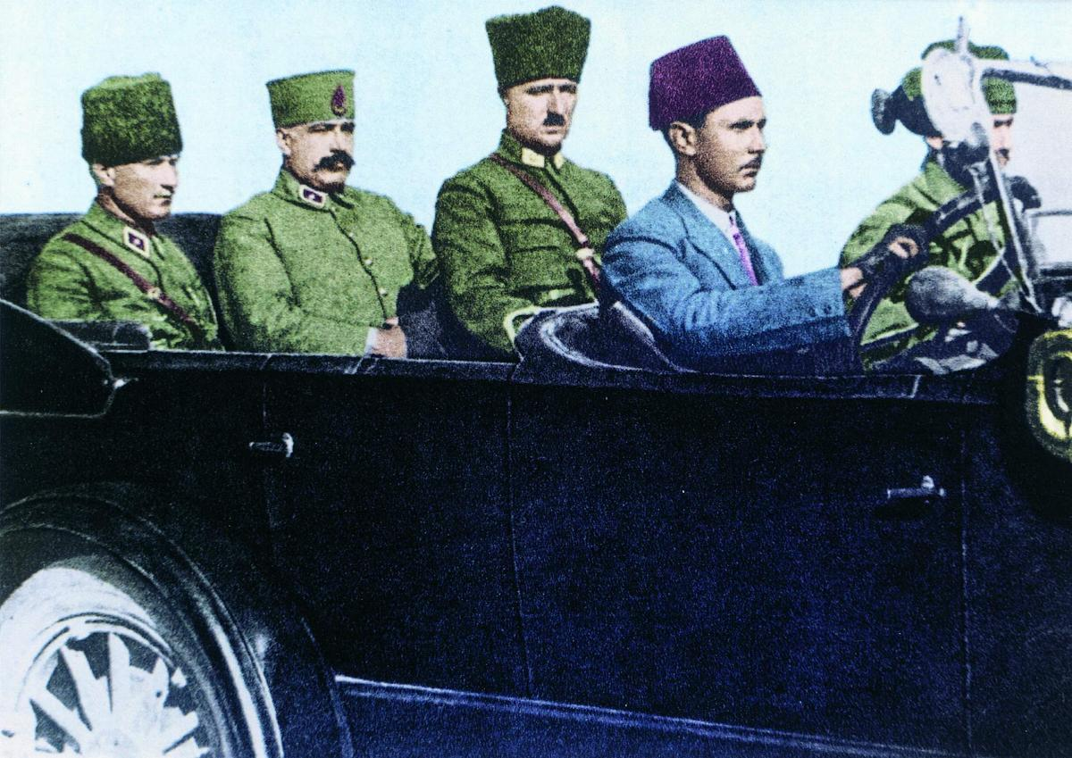 Atatürk ve kurmayları